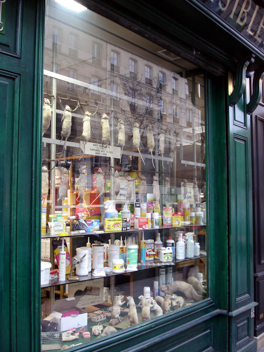 La boutique de dératisation de l'entreprise Julien Aurouze, rue des Halles à Paris, France.